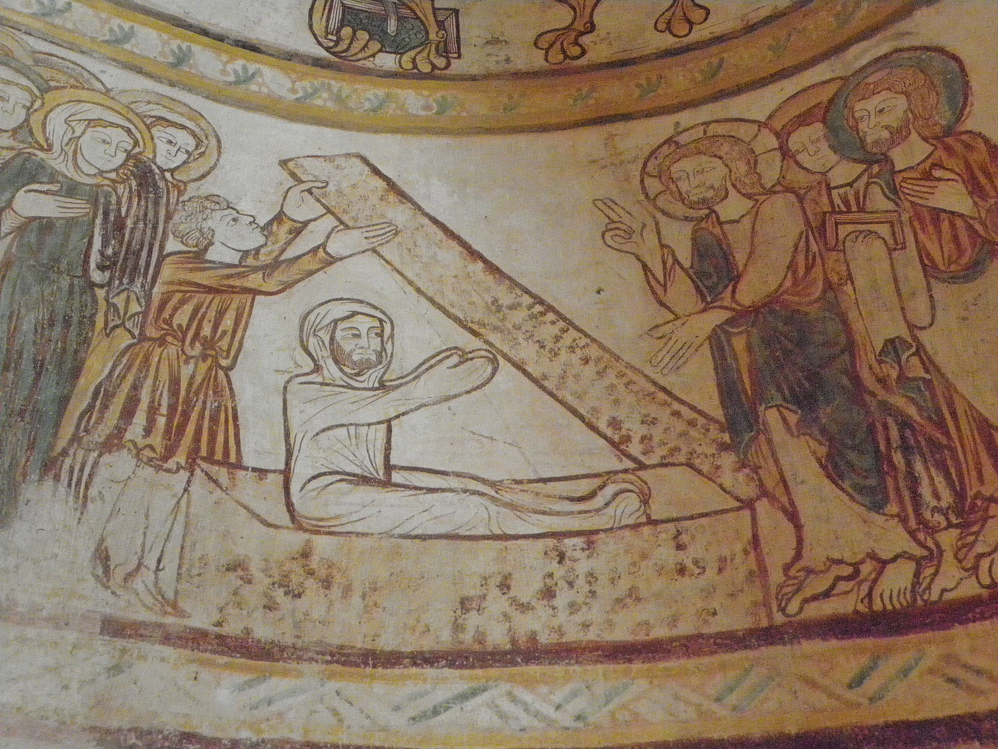 Intérieur de l'église Saint-Denis de Pontigné (49). Peintures murales de l'absidiole sud. Résurrection de Lazare. Détail.